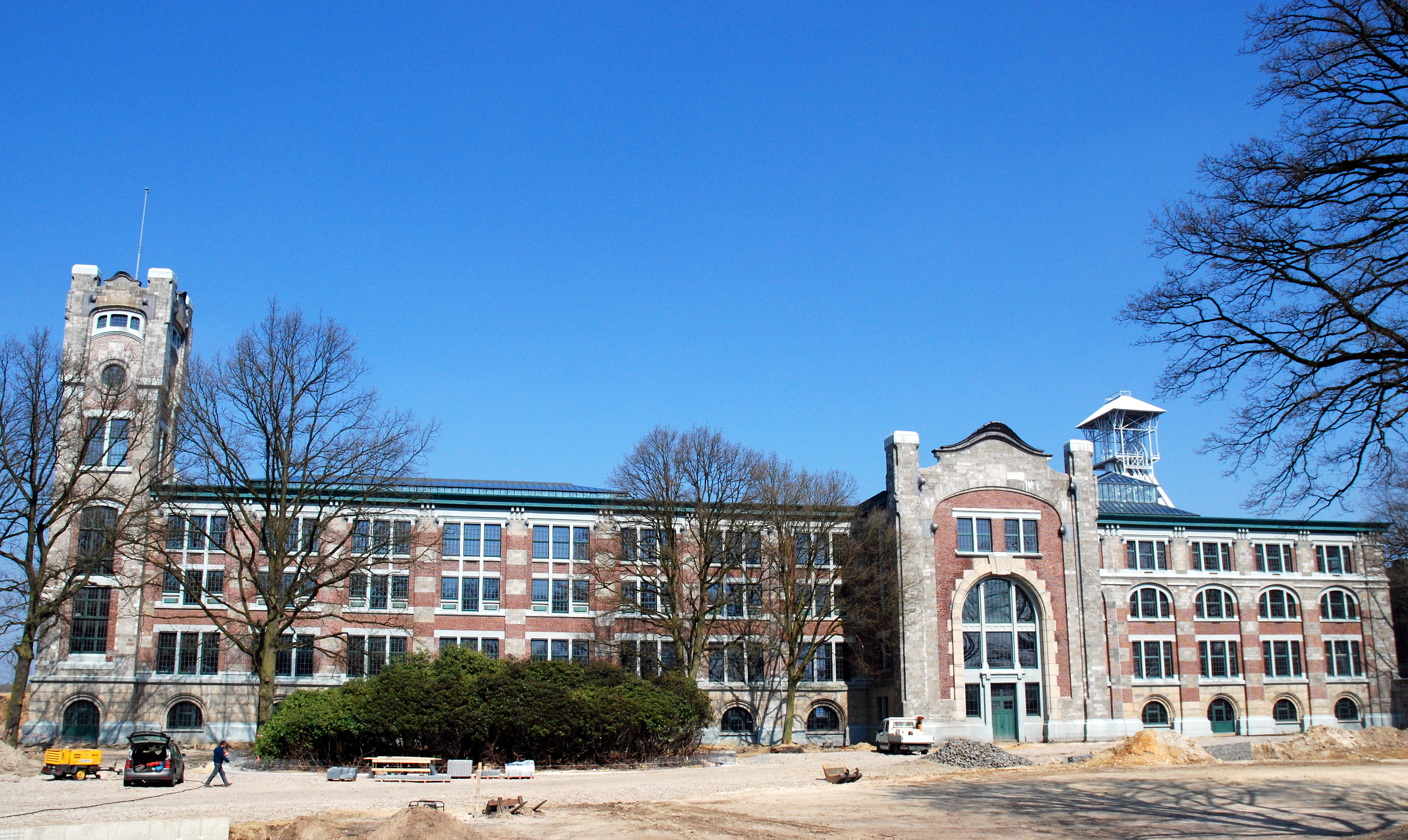 De steenkoolmijn van Waterschei, België